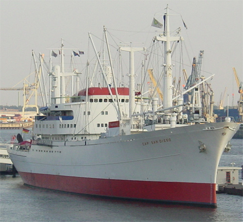 Foto: Andreas Gronski 2004, GNU_FDL (mit freundlicher Genehmigung des Fotografen)